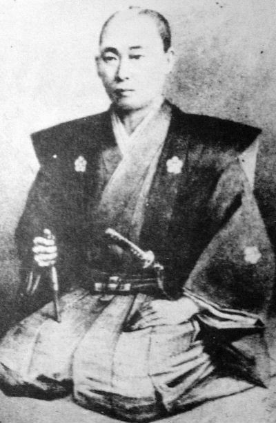 a Japanese man 梅田雲浜 (Unpin Umeda)